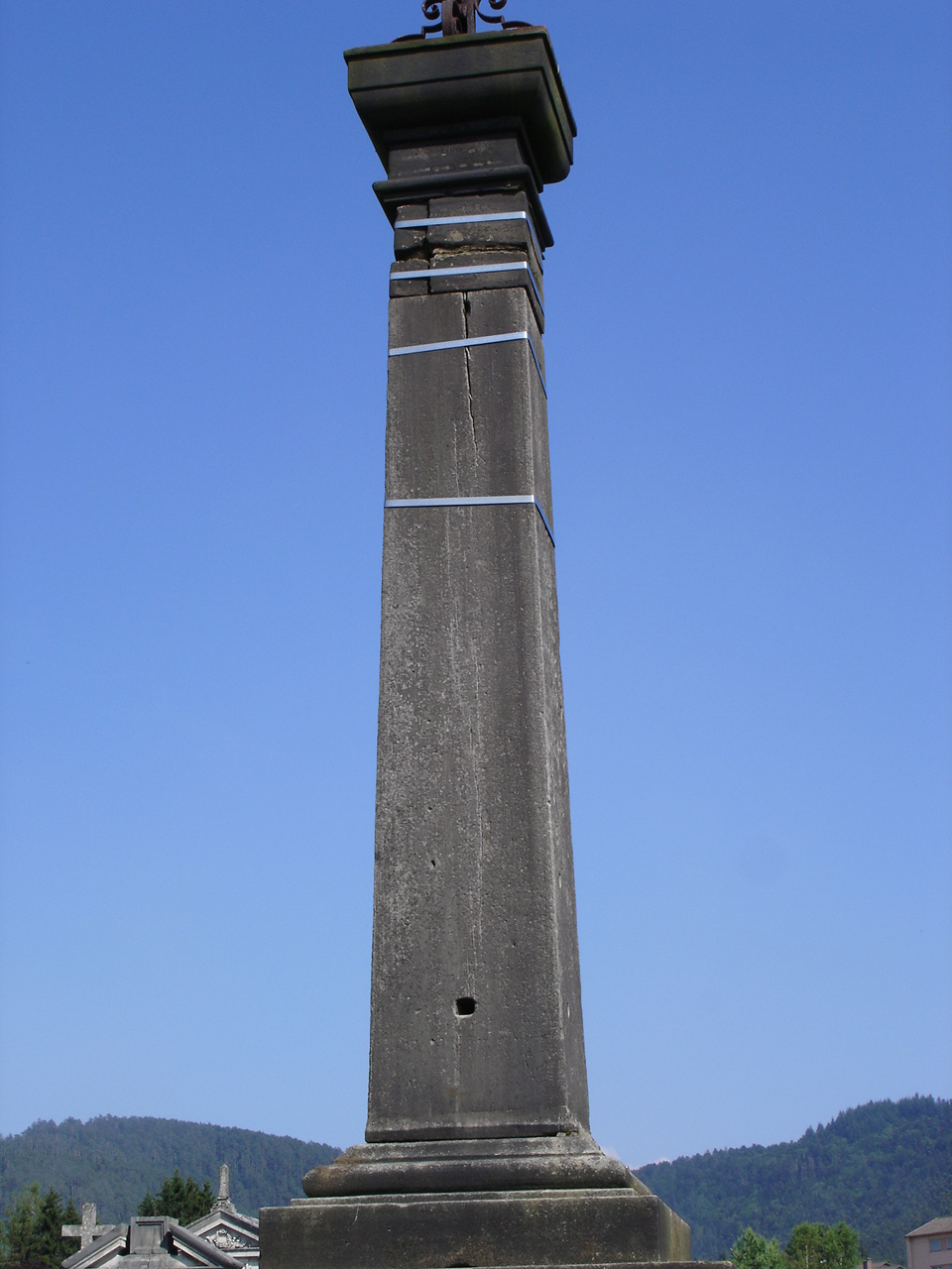 Fût grande croix du cimetière de la Haute Chapelle Raon-l'Etape